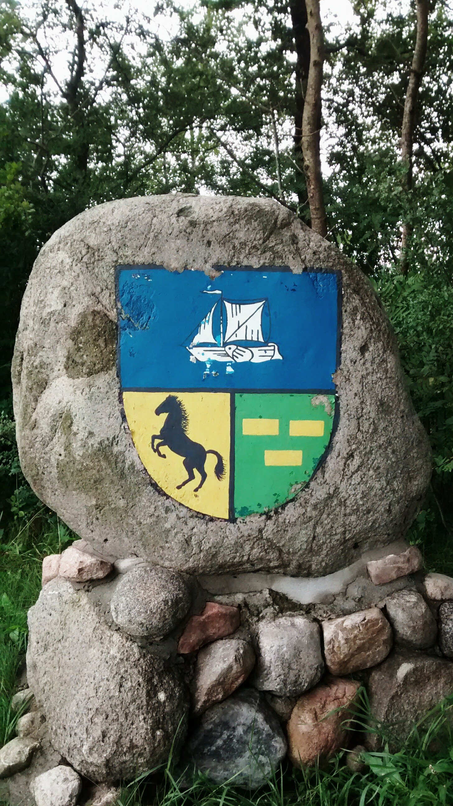 Wappen von Eastermar.